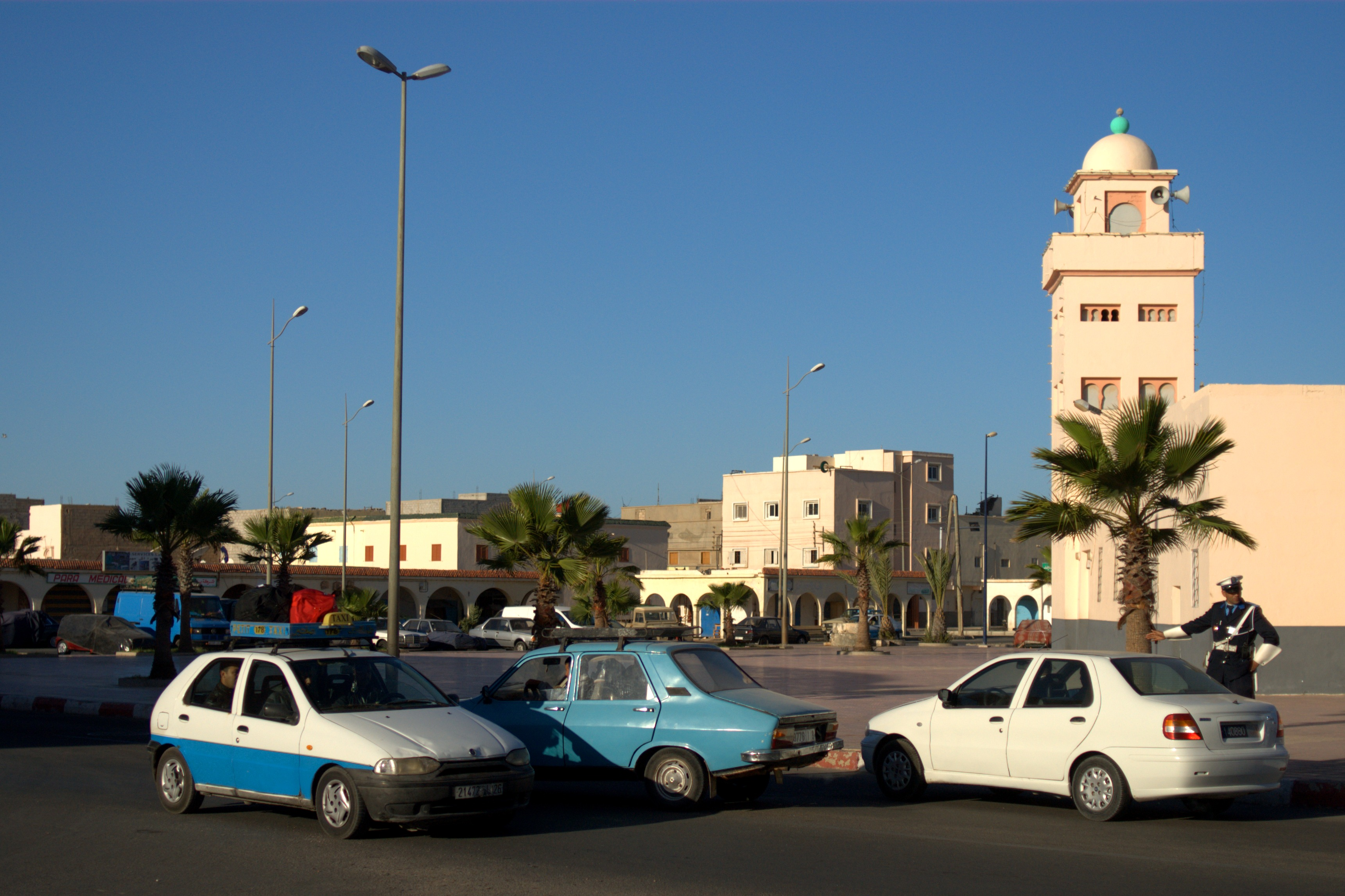 Vista de Dajla